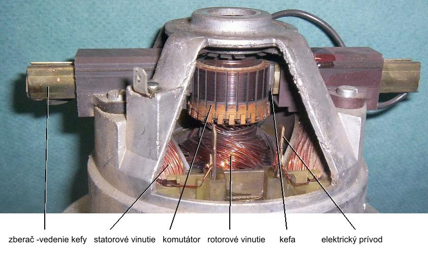 Reihenschlussmotor (Universalmotor) einer Staubsauger-Radialturbine.